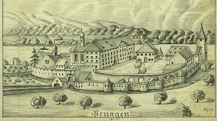 Deutschordenshaus Beuggen, Bleistiftzeichnung, 1875